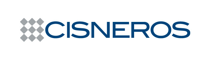 Logo de la Organizacion Cisneros